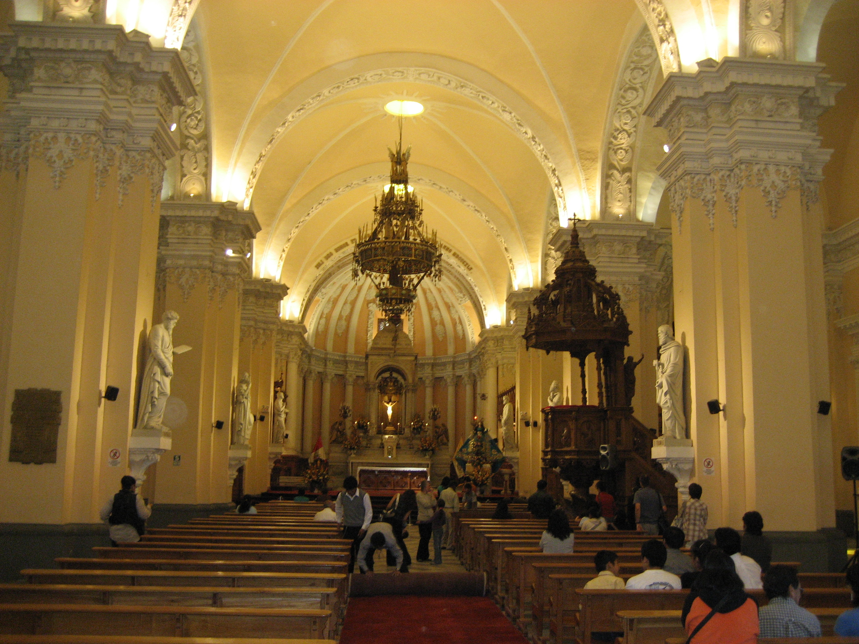 Catedral por dentro